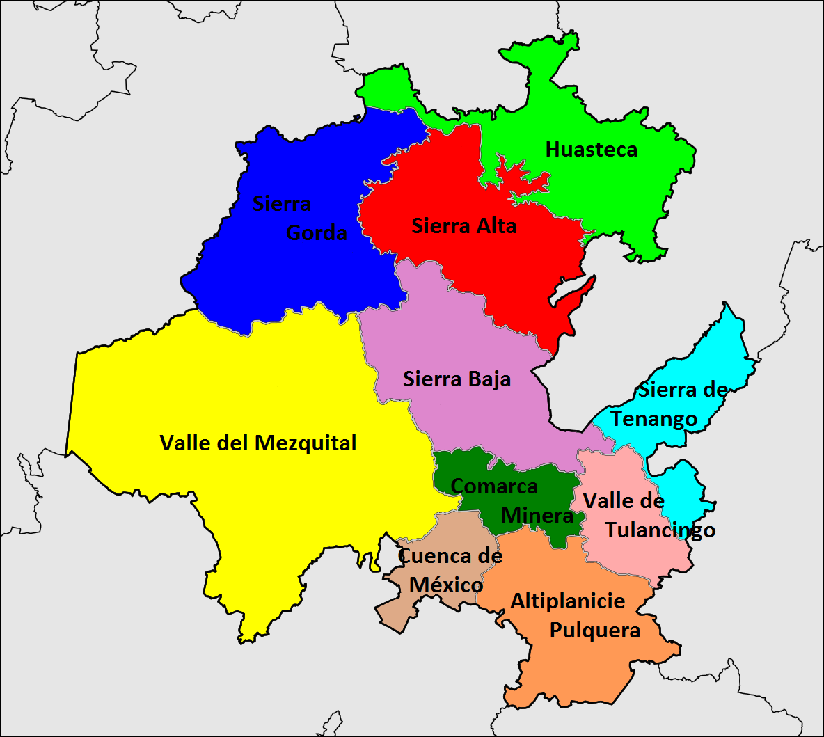 Region Geografica de Hidalgo